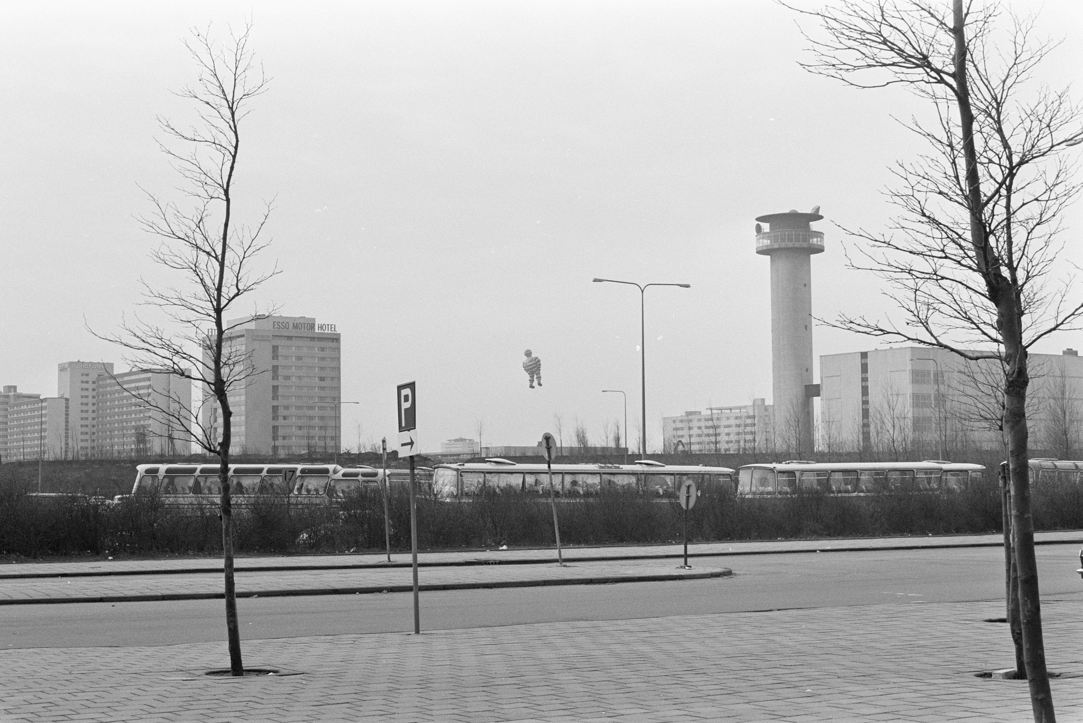 Collectie / Archief : Fotocollectie Anefo Reportage / Serie : [ onbekend ] Beschrijving : Esso Motor Hotel , exterieur, Amsterdam Datum : 19 februari 1971 Locatie : Amsterdam, Noord-Holland Trefwoorden : hotels Persoonsnaam : Esso Motor Hotel Fotograaf : Croes, Rob C. / Anefo Auteursrechthebbende : Nationaal Archief Materiaalsoort : Negatief (zwart/wit) Nummer archiefinventaris : bekijk toegang 2.24.01.05 Bestanddeelnummer : 924-2839 Reacties Geplaatst door Geschiedenismens - Hotels op 28 februari 2017 - 19:17. Locatie: wijk Buitenveldert NB. Dit hotel werd op 26 februari 1969 geopend.